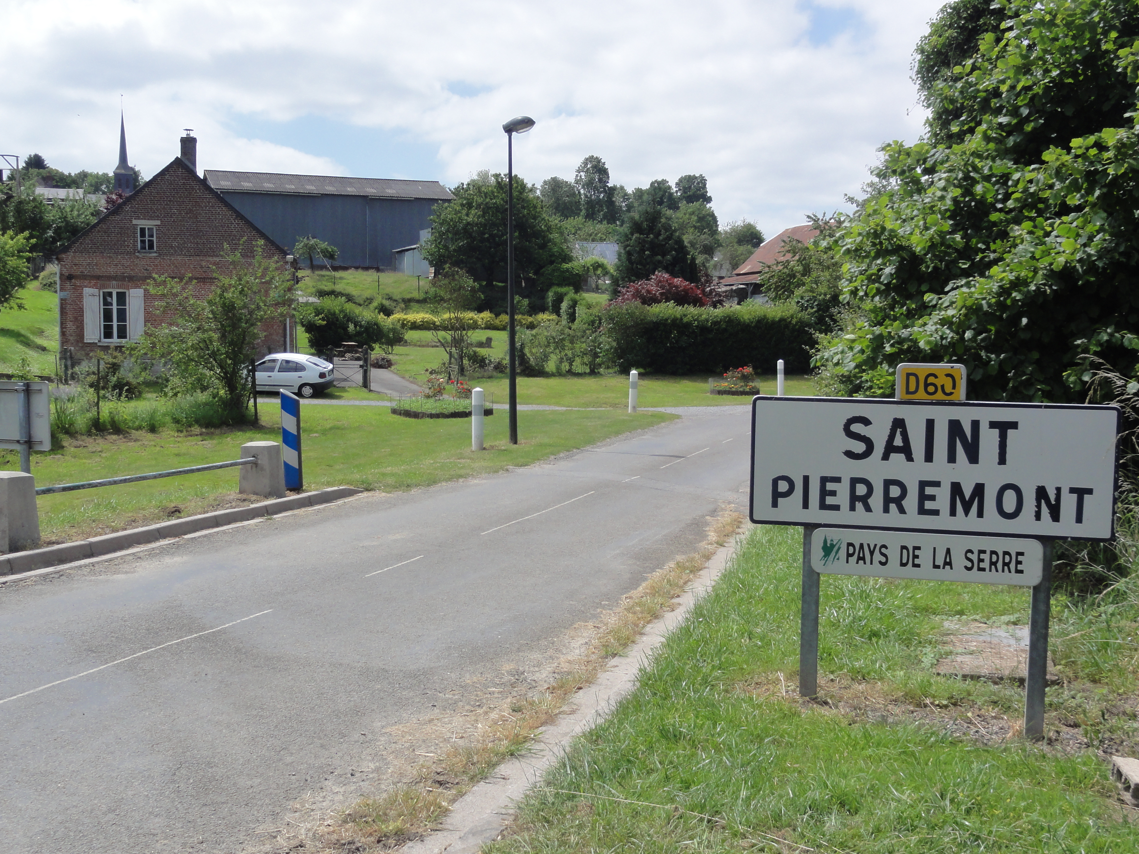 Saint-Pierremont (Aisne) city limit sign